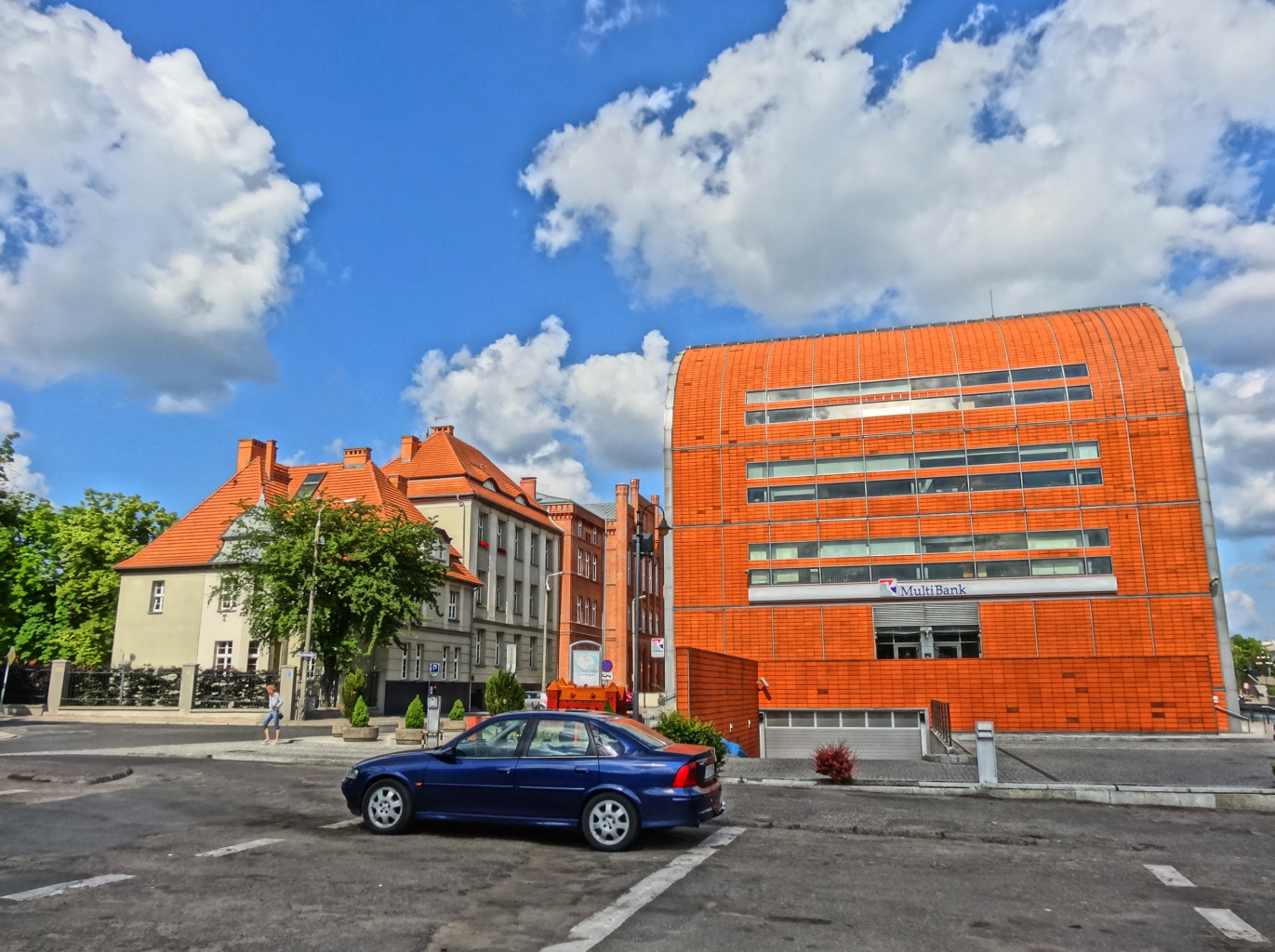 Plac Solny w Bydgoszczy